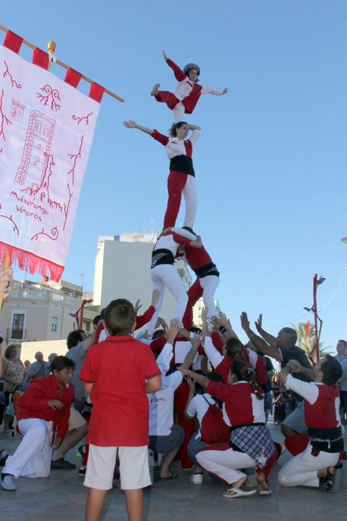 Muixeranga de Vinaròs Cameta